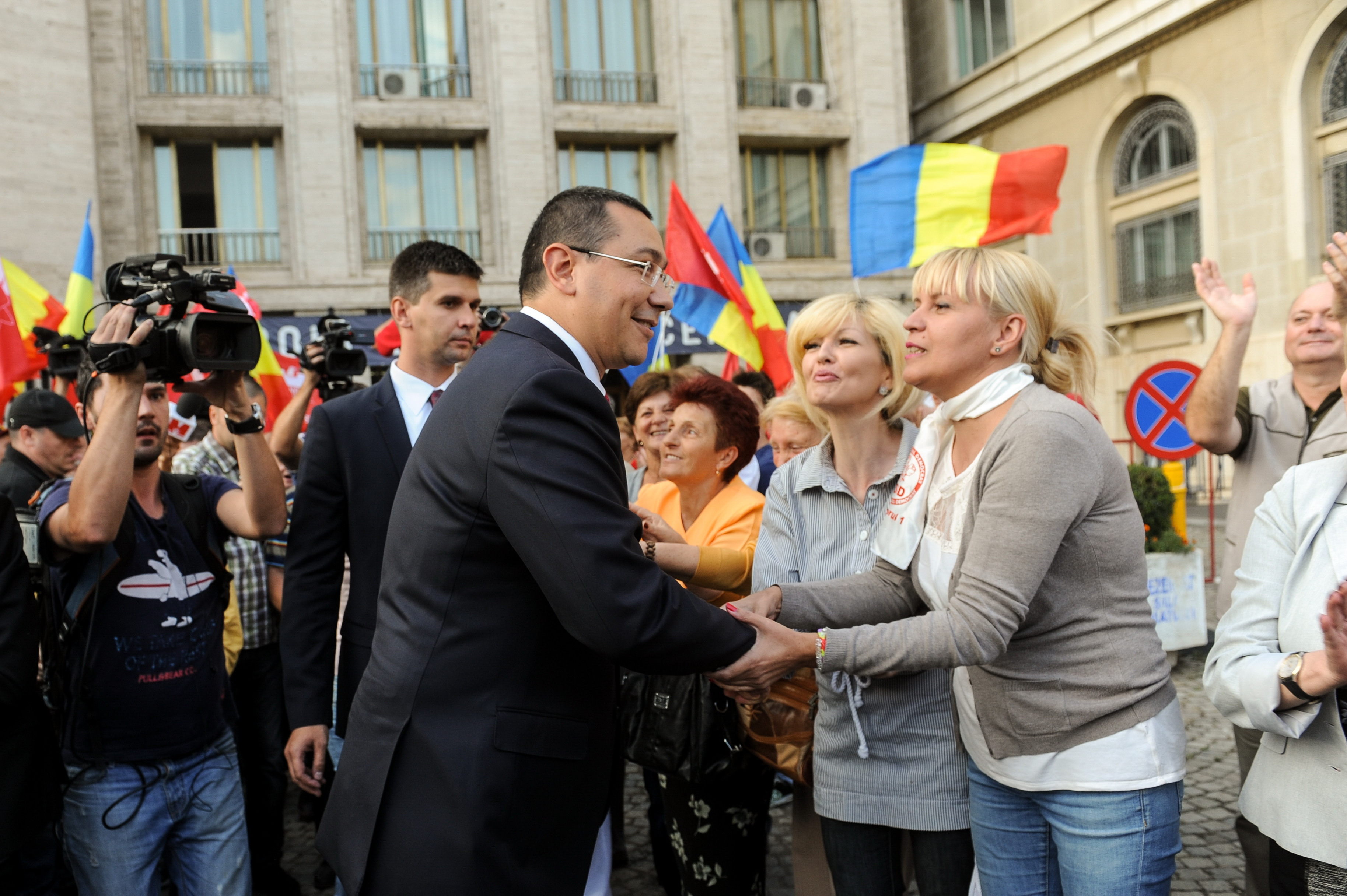 Depunerea candidaturii lui Victor Ponta pentru alegerile prezidentiale 2014 - 17.09 (17)